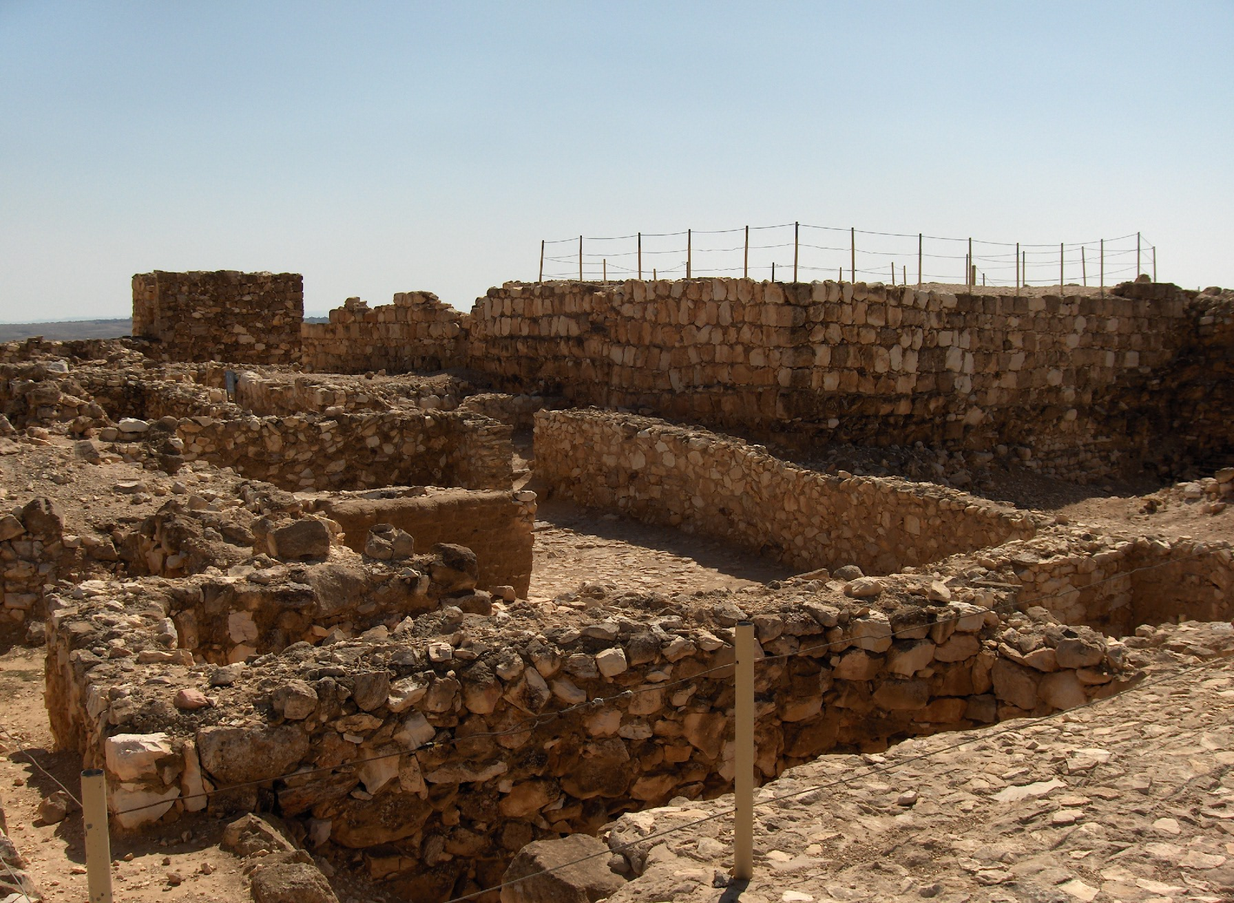 Site archéologique d'Arad, Israël